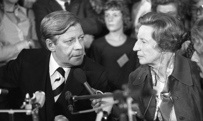 Bundestagswahl- Wahlnacht, Bundeskanzler Helmut Schmidt stellt sich den Fragen der Fernsehjournalistin Fides Krause-Brewer im Bundeskanzleramt